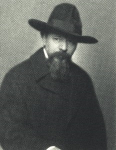 Porträt des Schriftstellers Theodor Lessing.